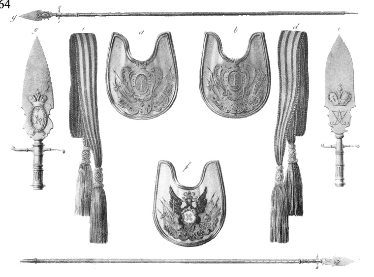 Офицерские знаки, Шарфы и Эспонтоны с 1732 по 1742 год. a и c Армейского и Гарнизонного Офицера; b и d Армейского и Гарнизонного Штаб Офицера; e Армейского и Гарнизон. Офицера; f и g Гв. Обер-Офицера.